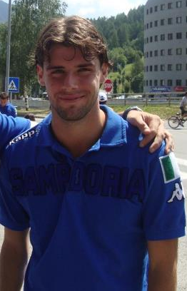 Andrea Poli durante il ritiro della Sampdoria a Bardonecchia.